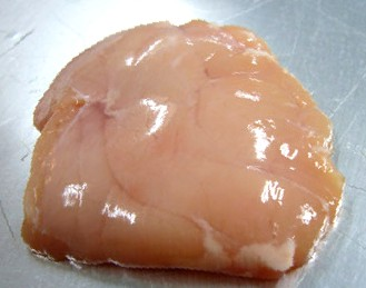 Ris d'agneau